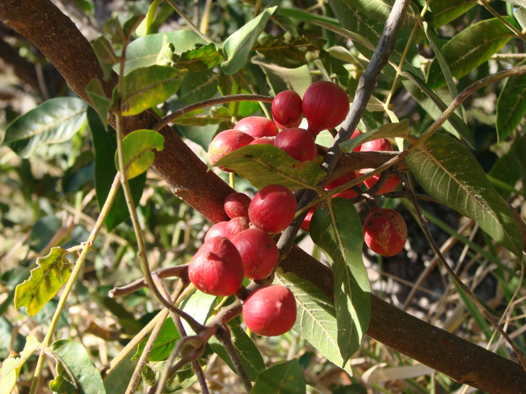 Cabralea canjerana - MELIACEAE Parque Nacional do Grande Sertão Veredas - Chapada Gaúcha - Minas Gerais - Brasil.